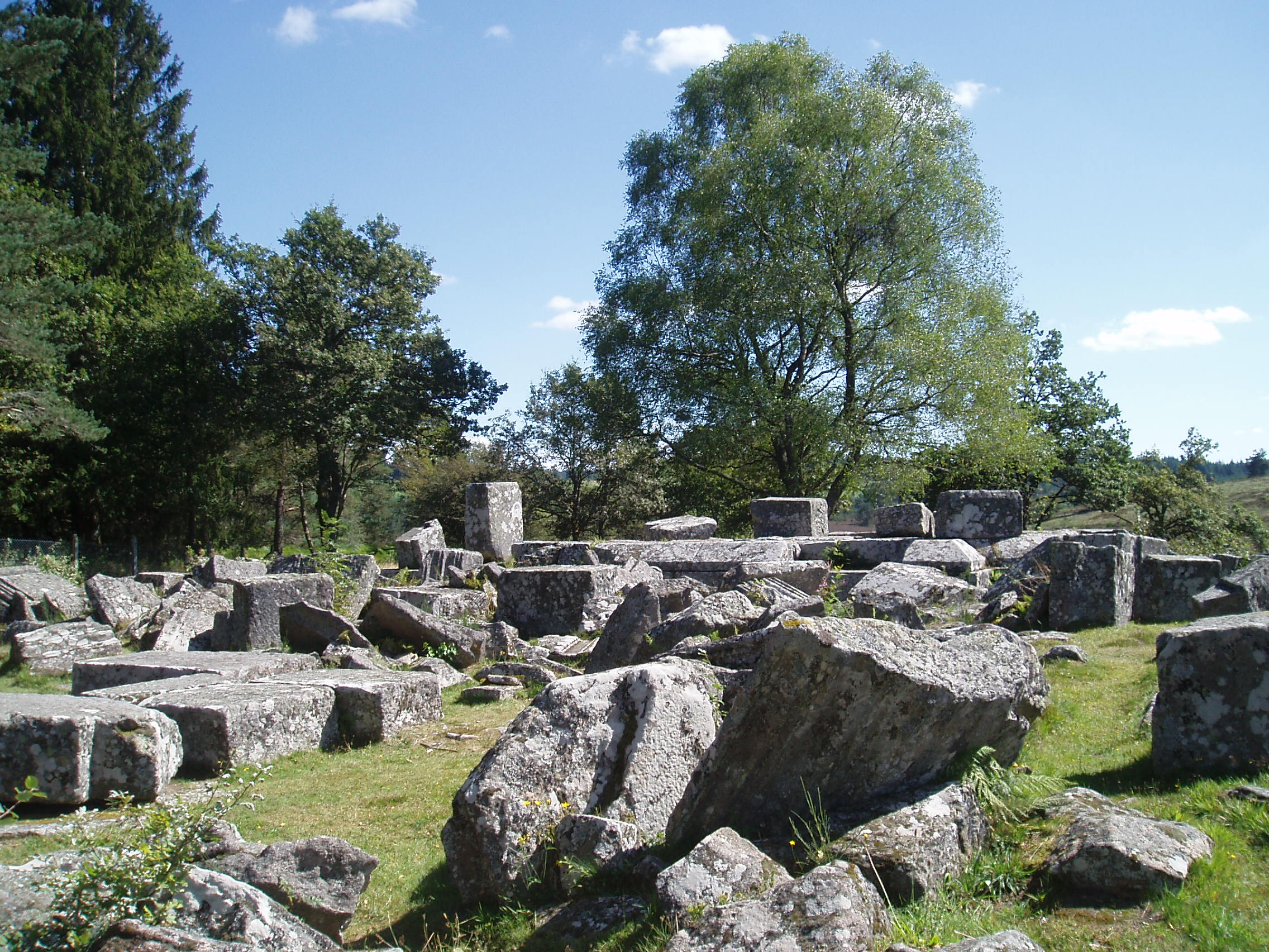 Site gallo-romain